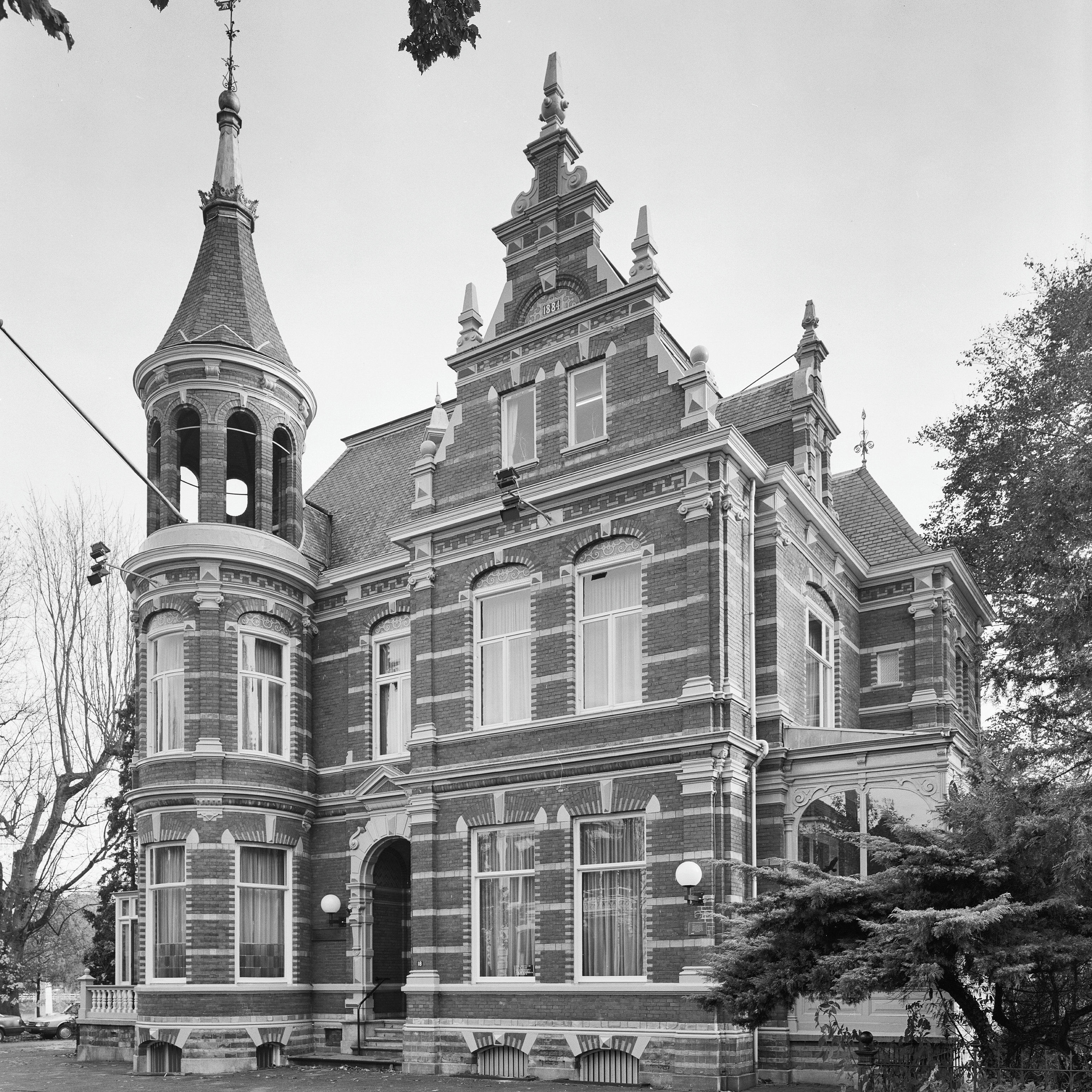 Beeldhouwwerk/ Poort: Overzicht voorgevel met toren en rechter zijgevel met serre, villa (opmerking: Gefotografeerd voor Monumenten In Nederland Overijssel, bladzijde 303)